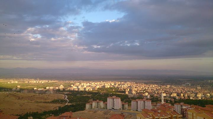 Malatya toplu konutlardan bir görüntü..